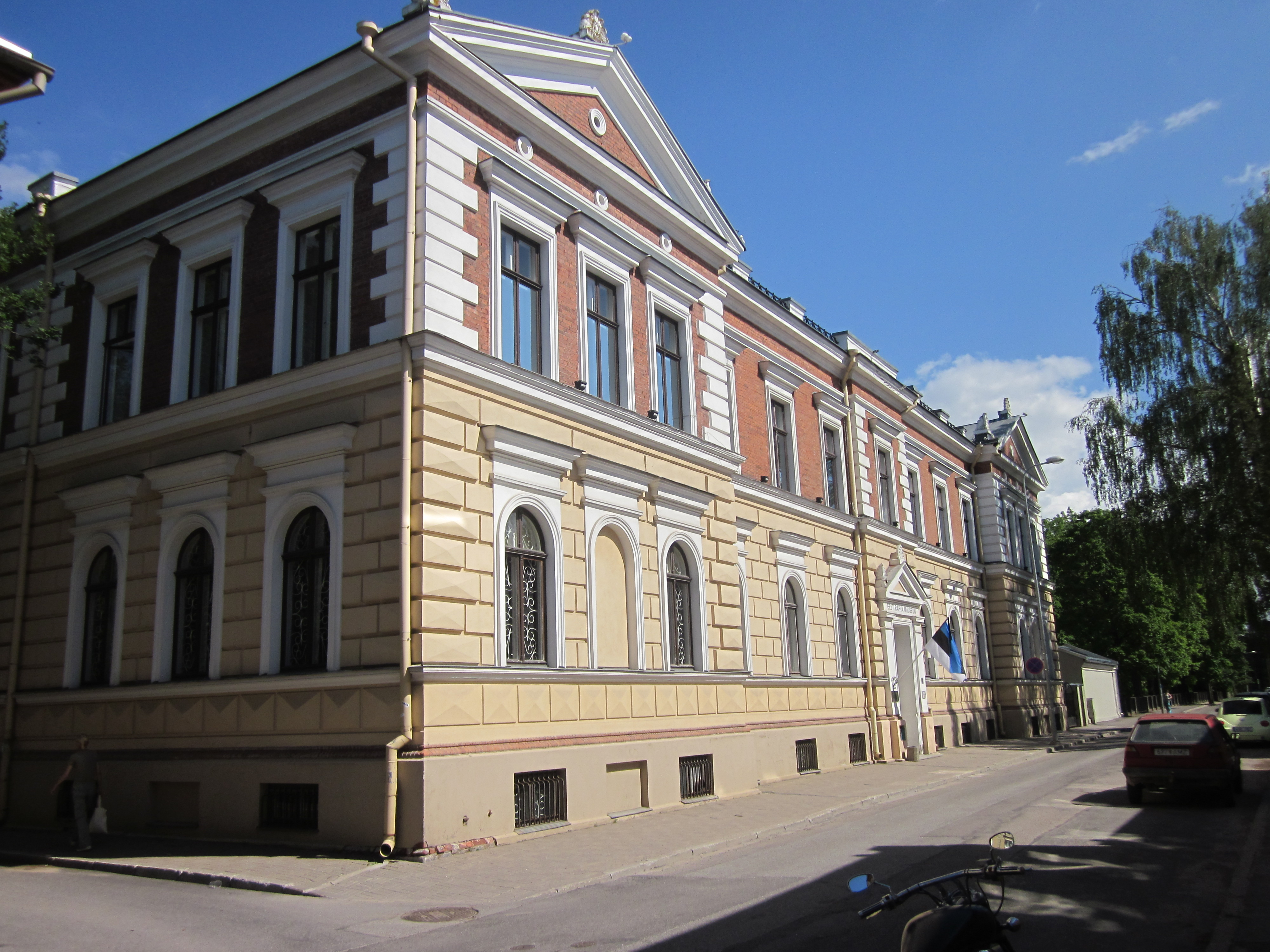 ERMi hoone. Arhitekt Vladimir Lunski (†1920)